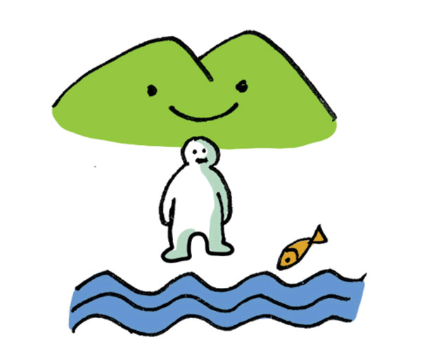 배산임수 한자어의 뜻을 설명한 그림